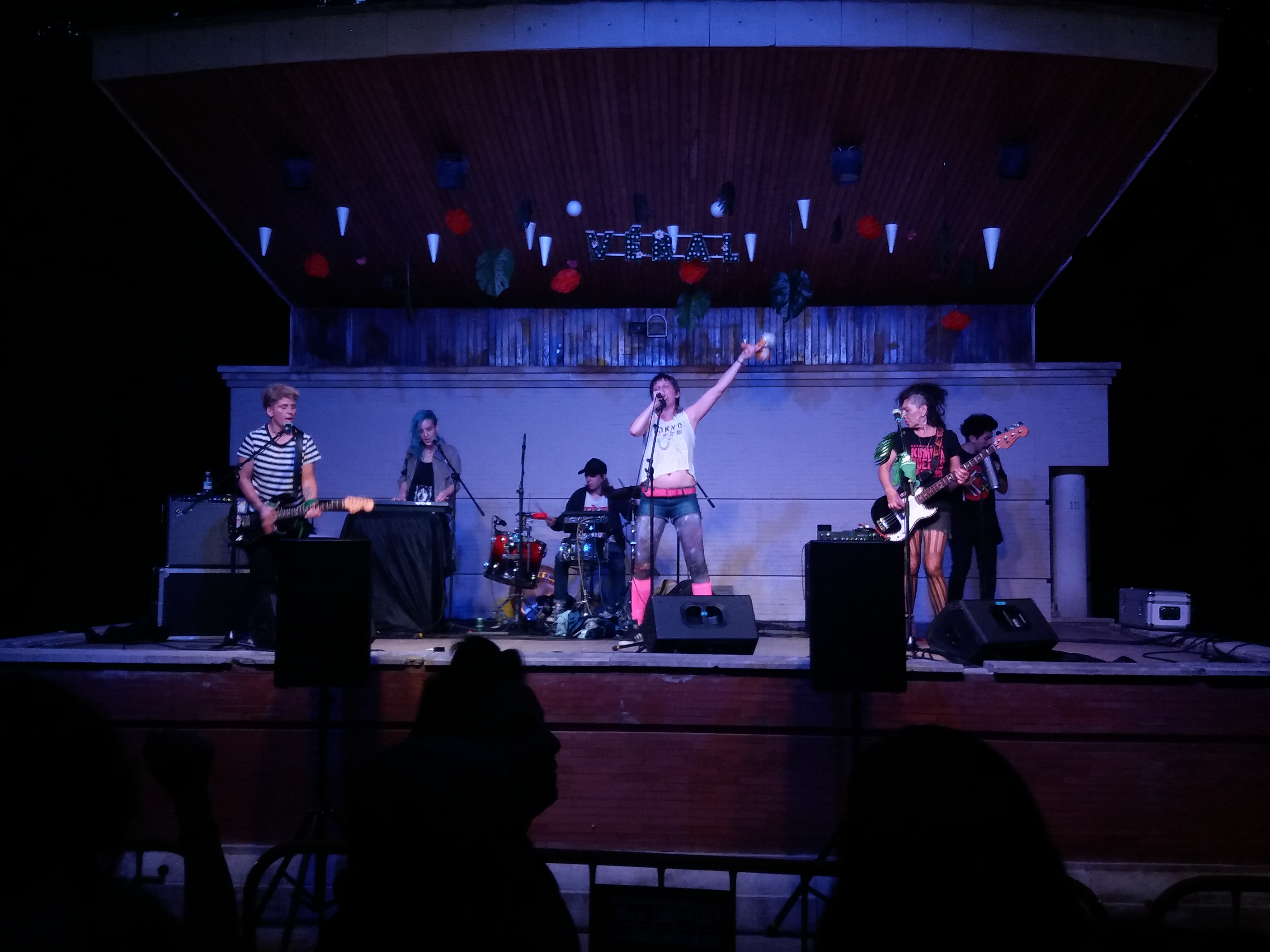 Concierto del grupo argentino Kumbia Queers en la pérgola del Campo Grande de Valladolid (España)